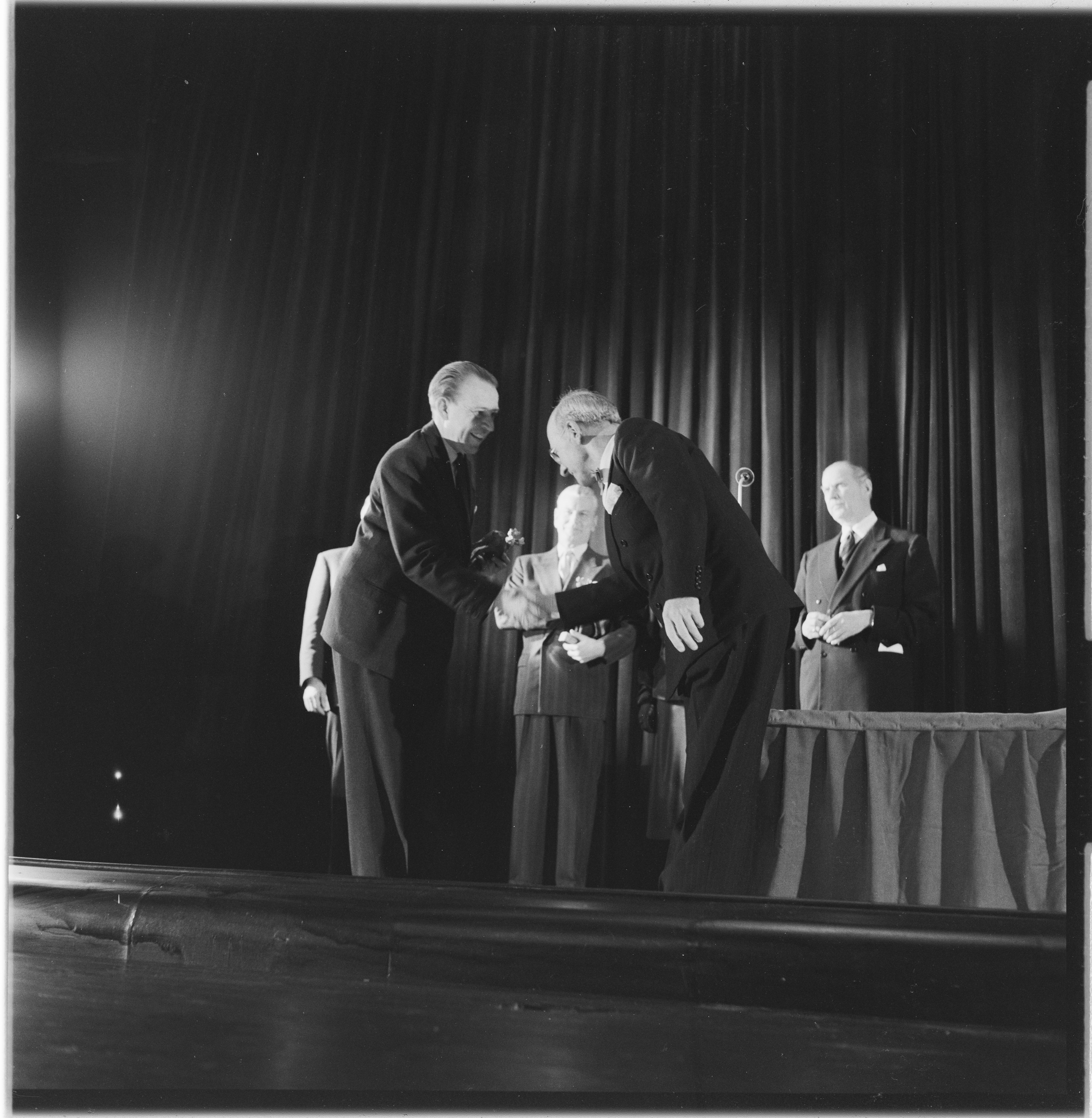 Bildet er hentet fra Arkivverket. Åmodt-prisen til Kr. Åmodt, Tancred Ibsen, Alfred Maurstad og Kåre Bergstrøm. NÅ nr. 43, 1955. Arkivinstitusjon : Riksarkivet Arkivnavn : Billedbladet NÅ Sted : Norge, Oslo, Oslo, Klingenberg kino Emneord: prisutdeling Avbildet